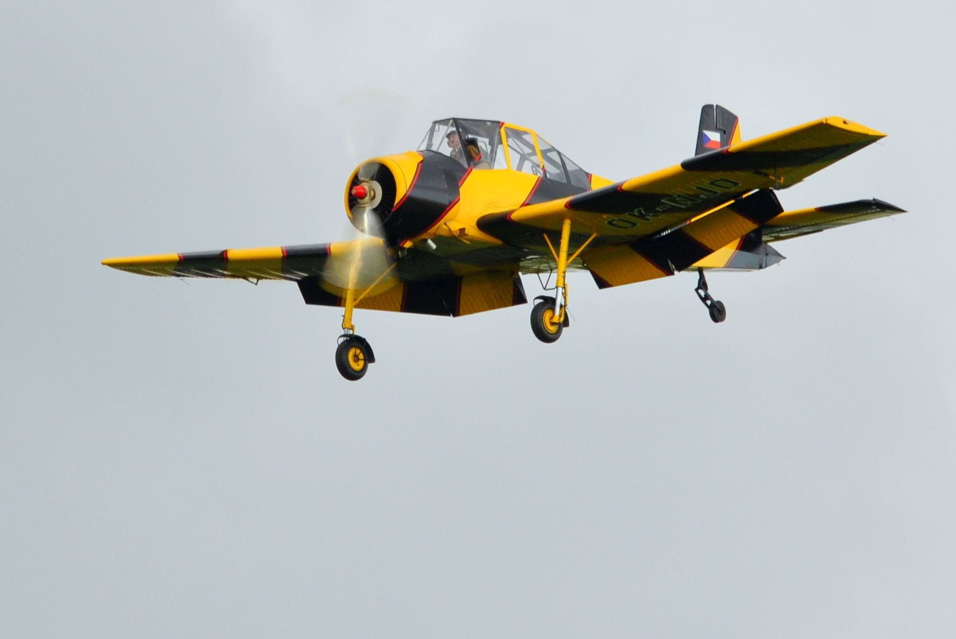 Ostrów Wlkp., lotnisko w Michałkowie. Zlín Z-37A-C3 Čmelák podchodzi do lądowania.